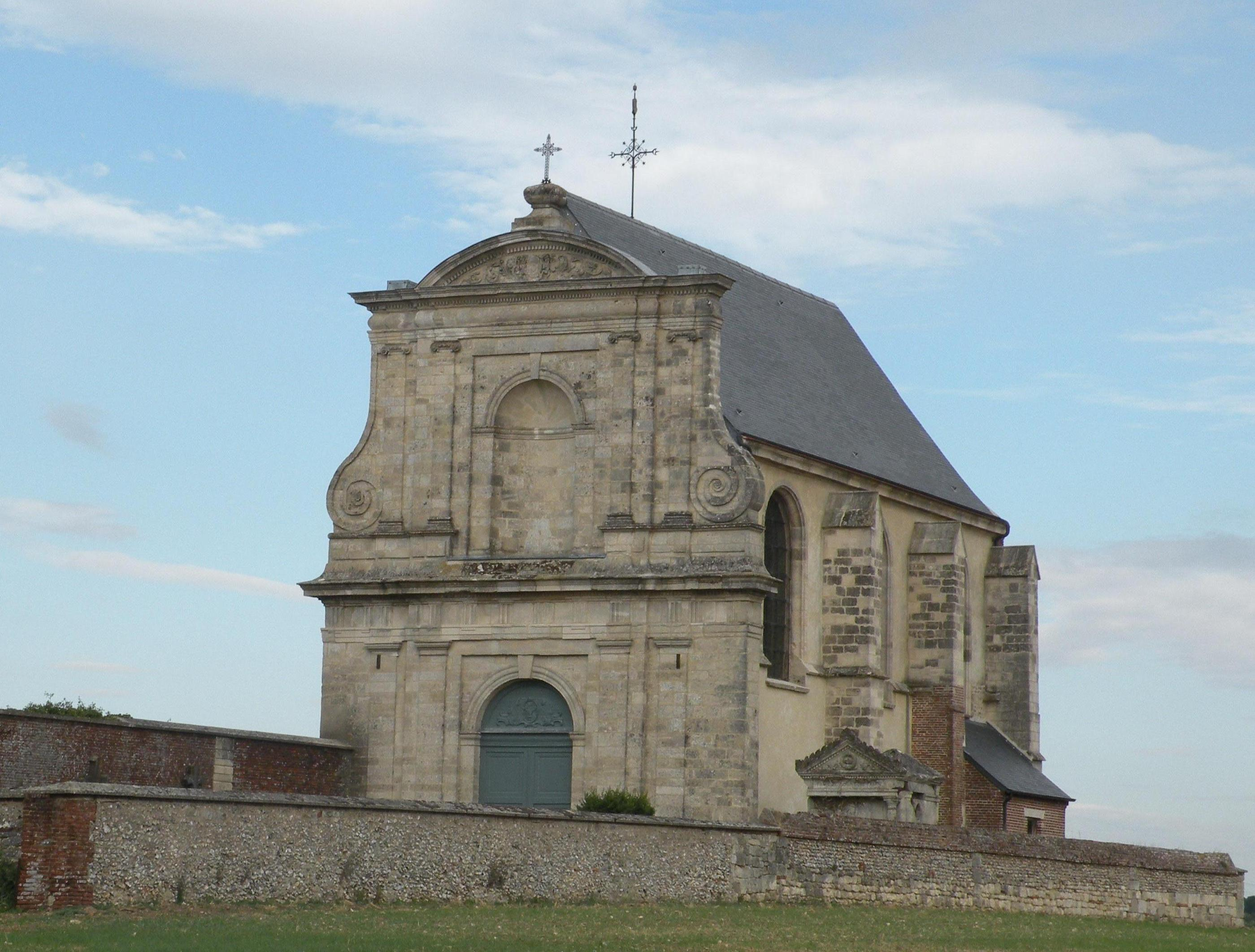 vestige de Ressons-l'Abbaye